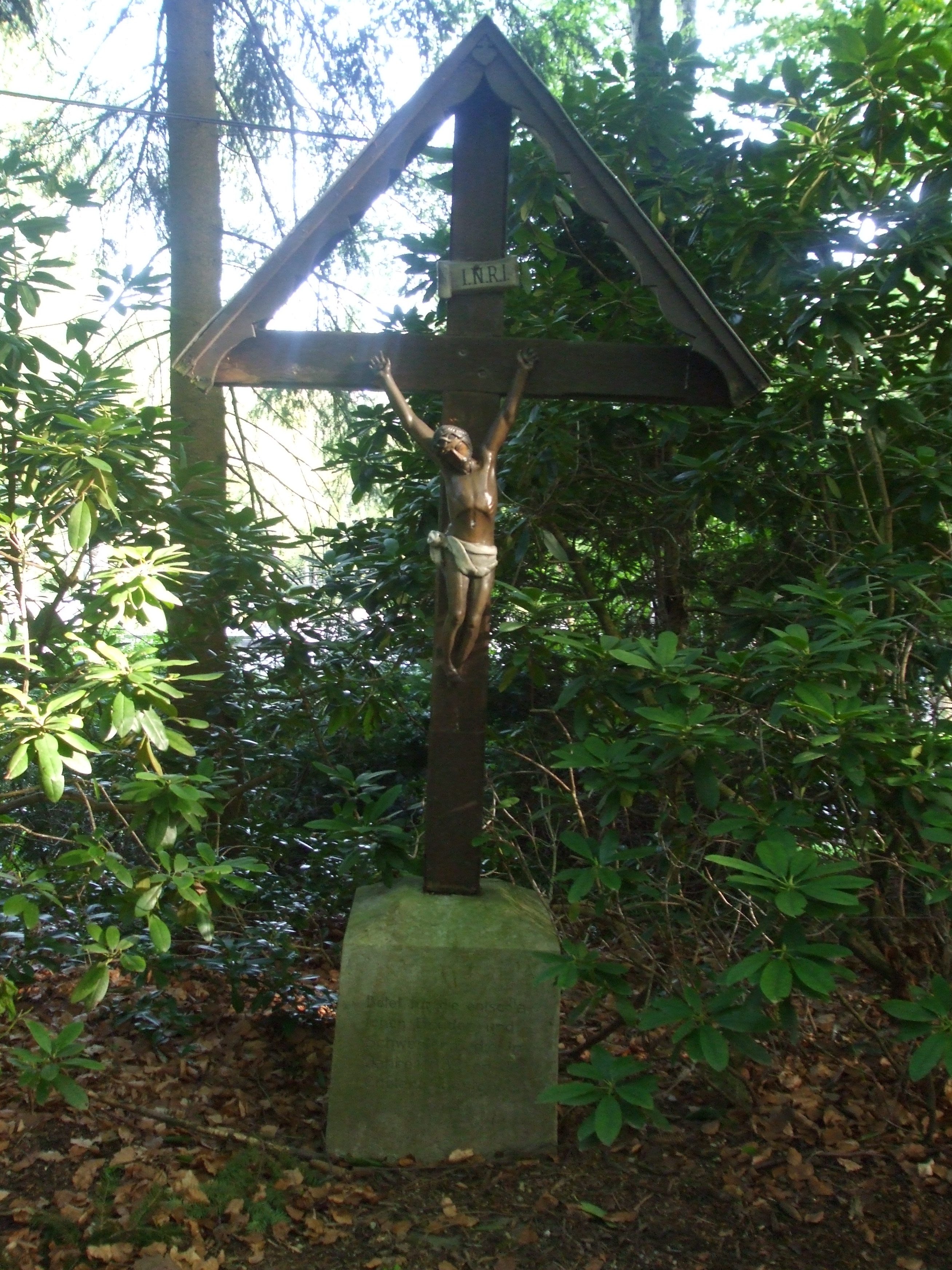 Waldfriedhof Aachen, Cholerakreuz „Betet für die entschlafenen Brüder und Schwestern, die im Jahre 1832 an der Cholera gestorben sind“